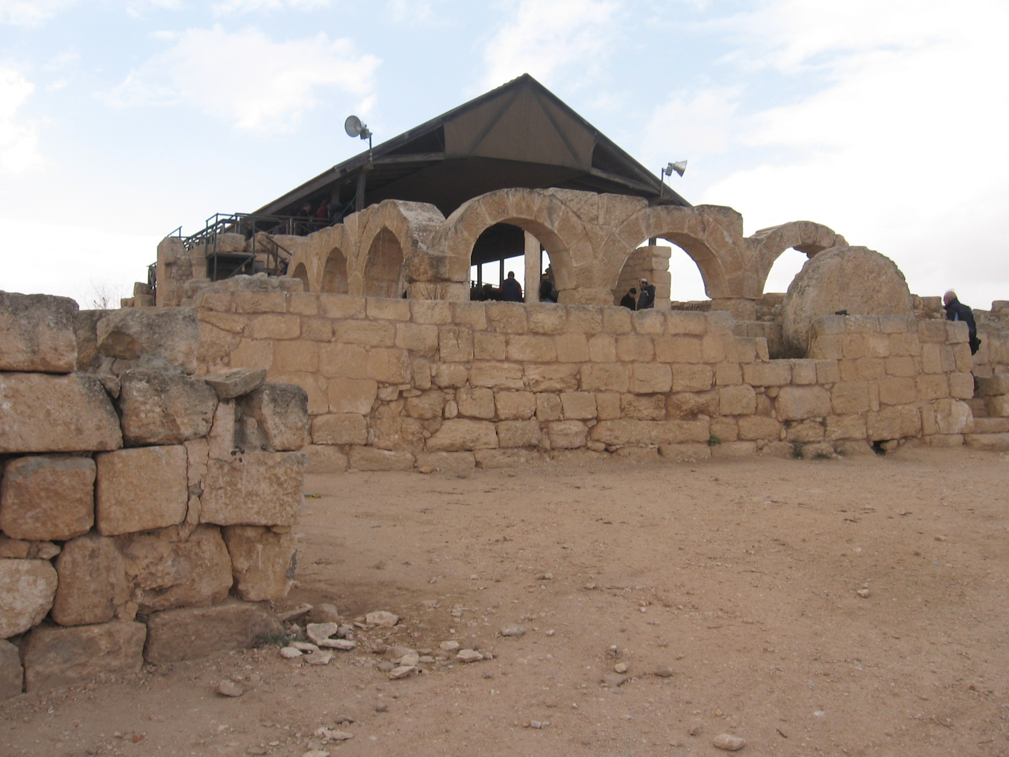 Susia_synagoque